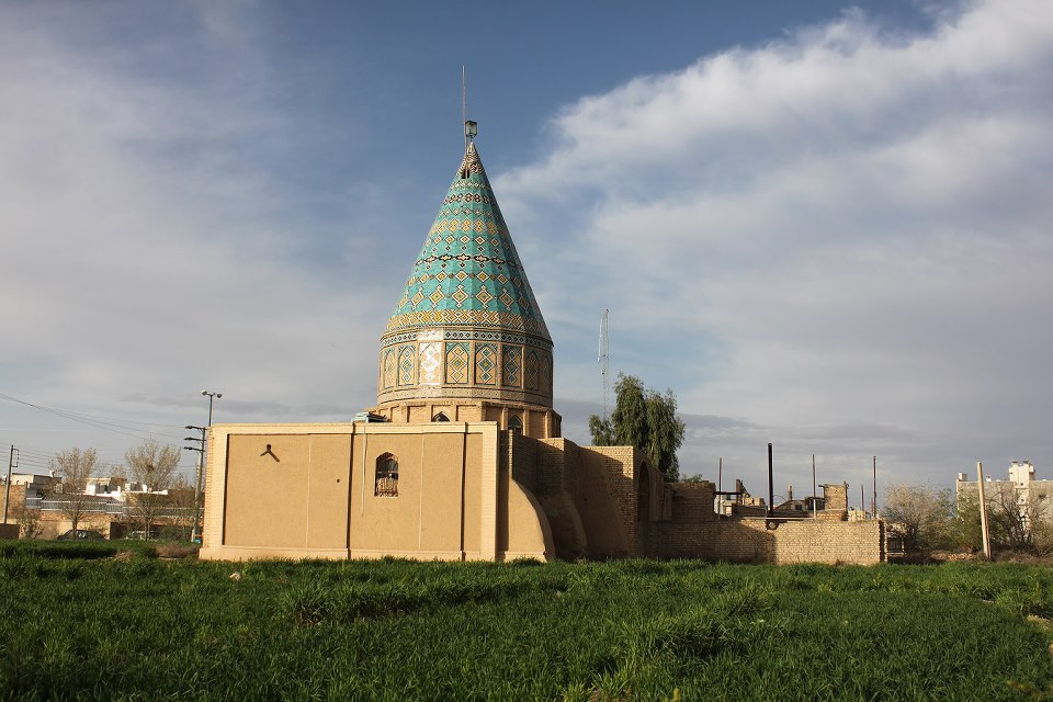 آرامگاه ابولولو